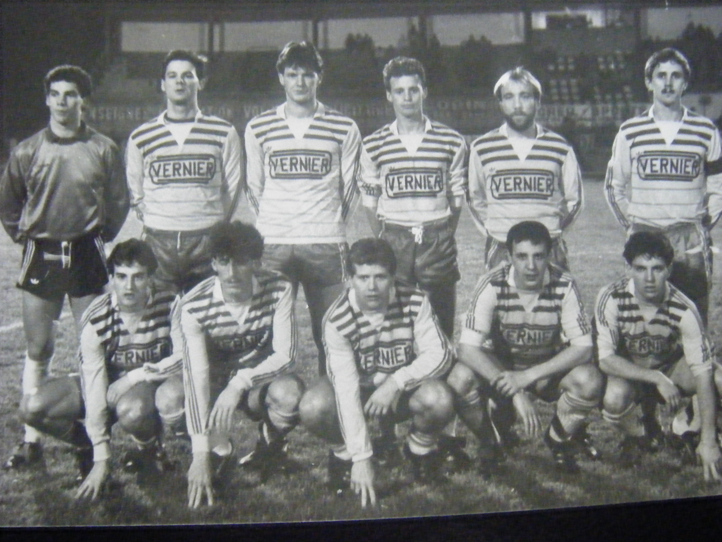 AS CREIL Saison 1985-1986